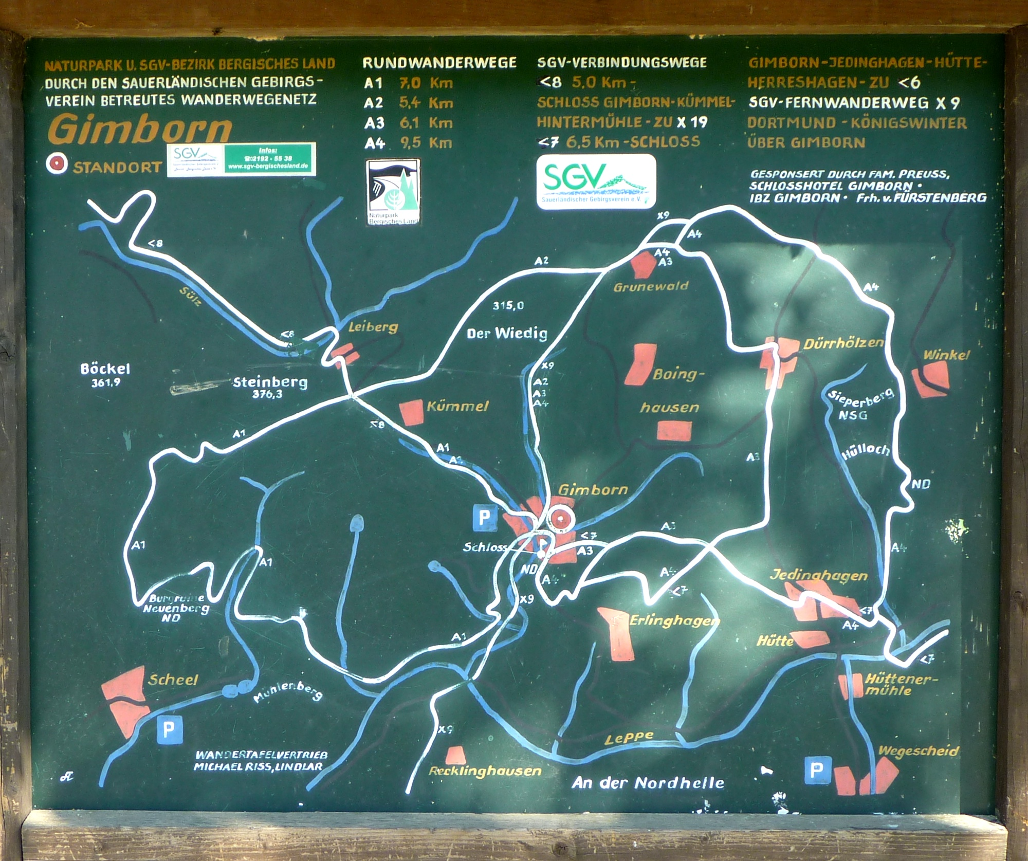 Darstellung der Wanderwege in und um Gimborn auf einer öffentlich aufgestellten Tafel in der Ortsmitte